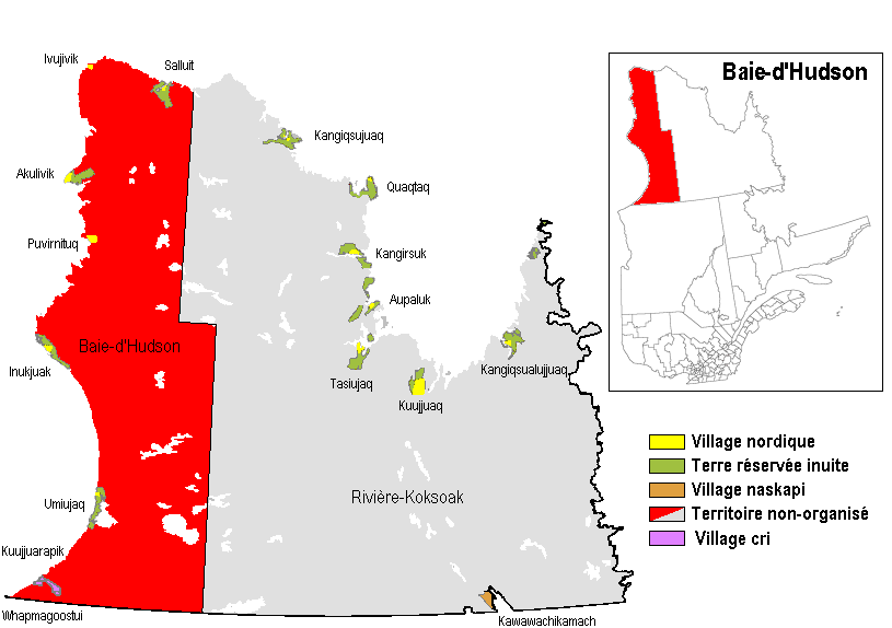 Baie-d'Hudson est un territoire non organisé faisant partie de l'administration régionale Kativik située dans la région administrative du Nord-du-Québec au Québec